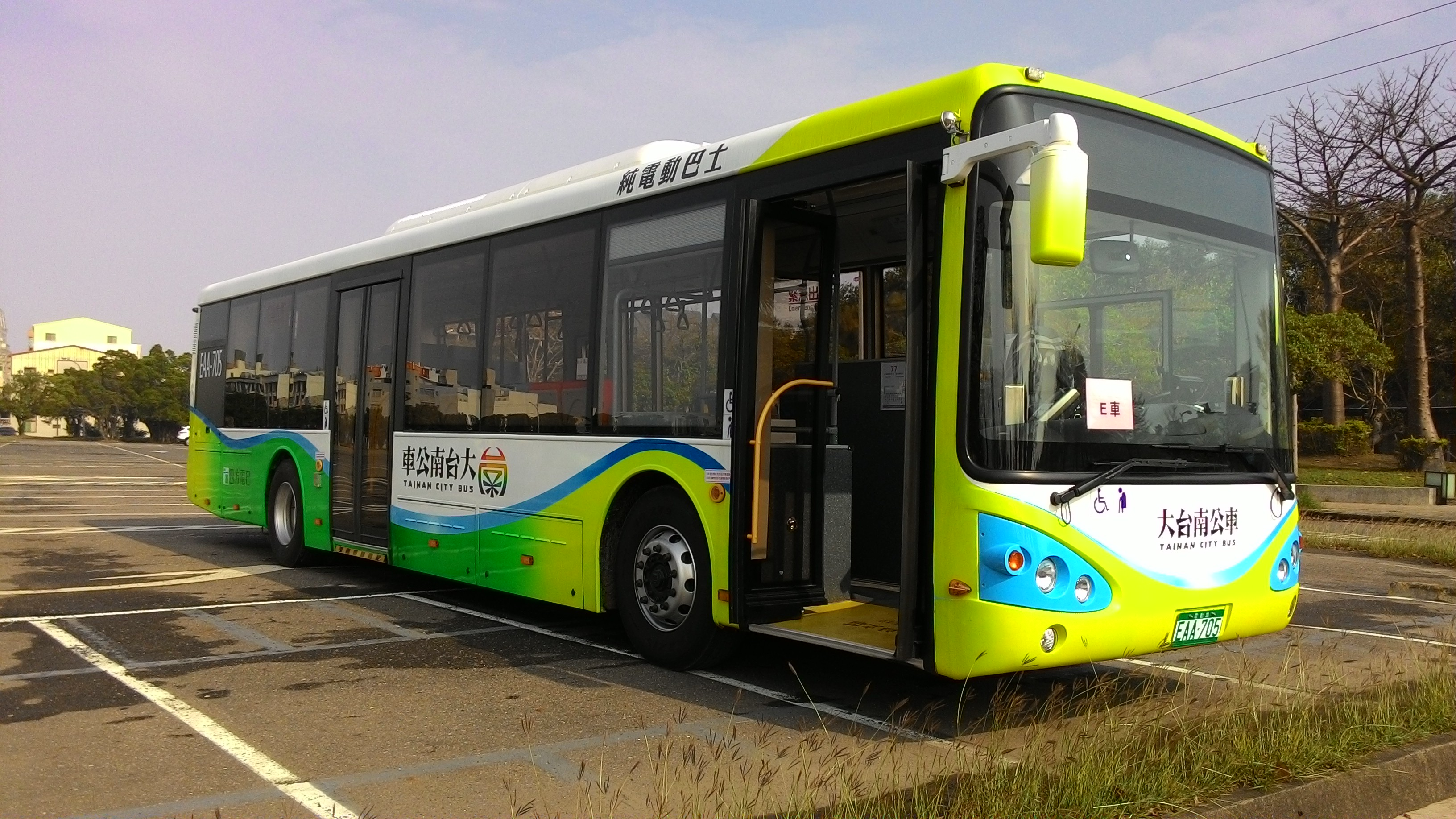 四方電巴申沃SWB6121EV電動巴士EAA-705靜置在安平原住民文化園區旁停車場。